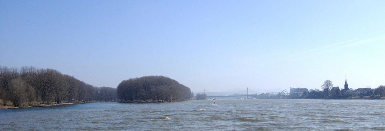 Siegmündung (links), Kemper Werth, Friedrich-Ebert-Brücke, der Bonner Hafen und Graurheindorf